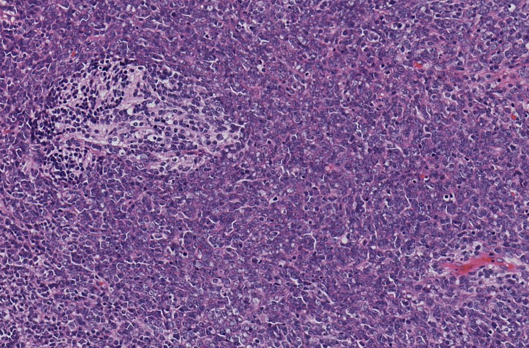 Desmoplastic/nodular Medullablastoma, WHO grade IV